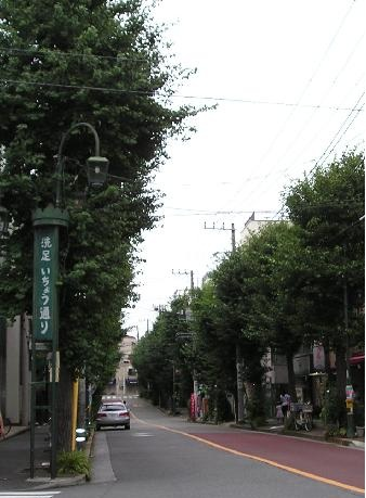 東急目黒線洗足駅並木道